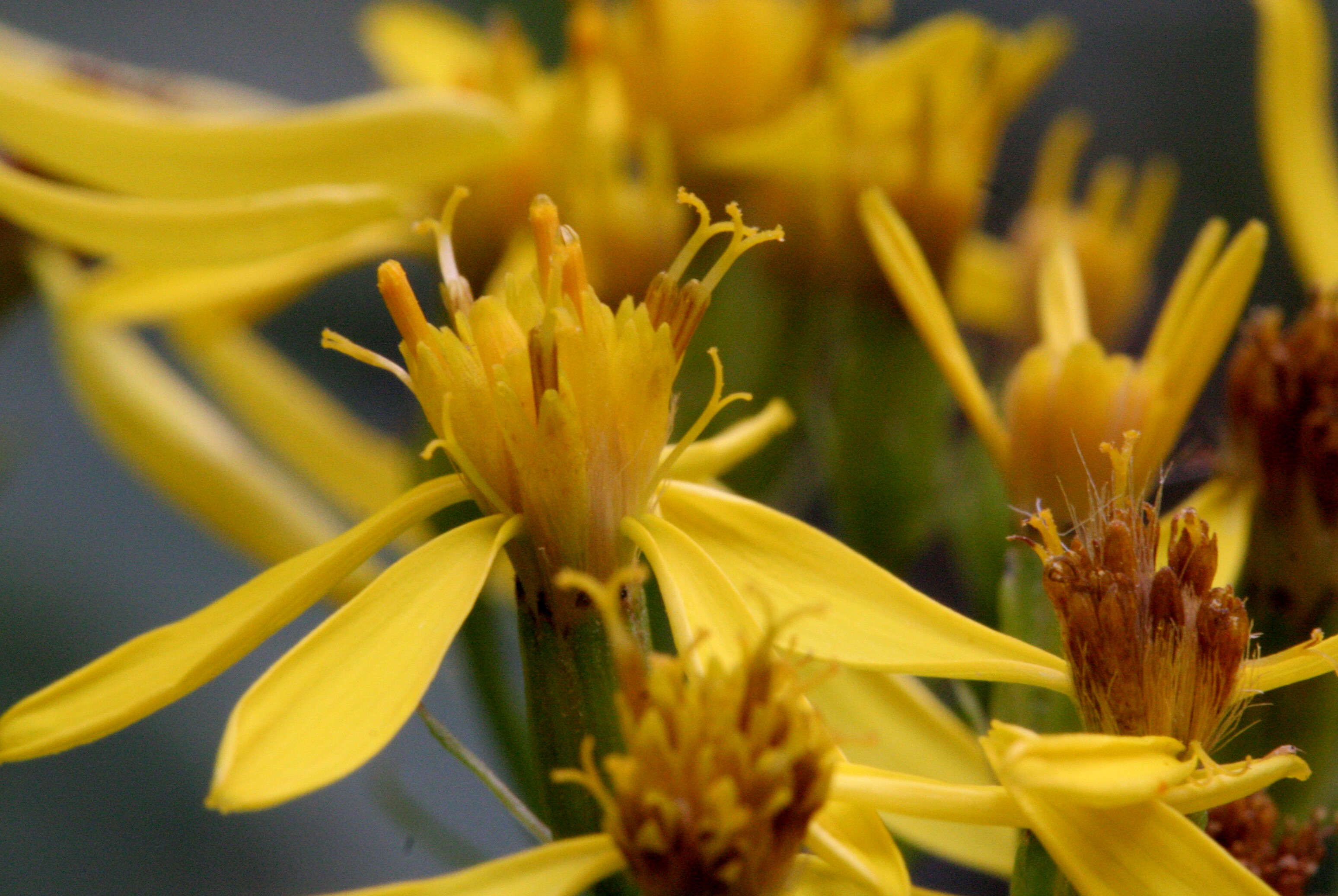 Senecione di Fuchs - Pianezze, Trichiana (BL), 859 m s.l.m.